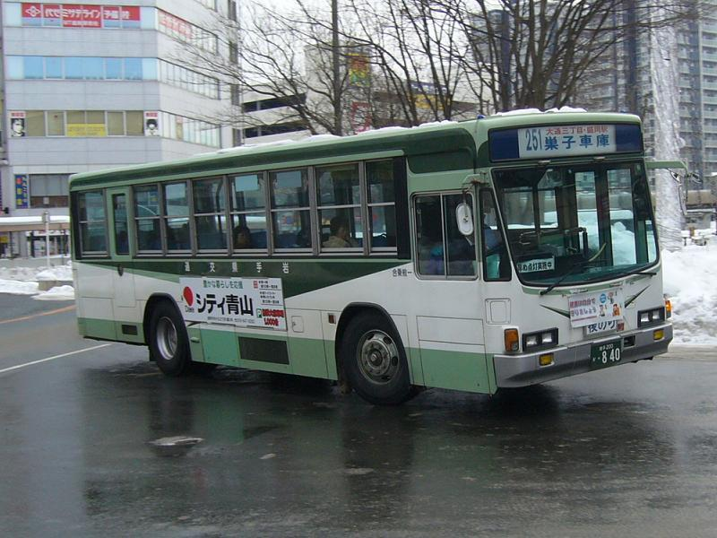 登録番号 岩手200か・840 岩手県交通所属 2006年1月1日 盛岡駅前にて撮影 撮影者 Tokatsu kokubu